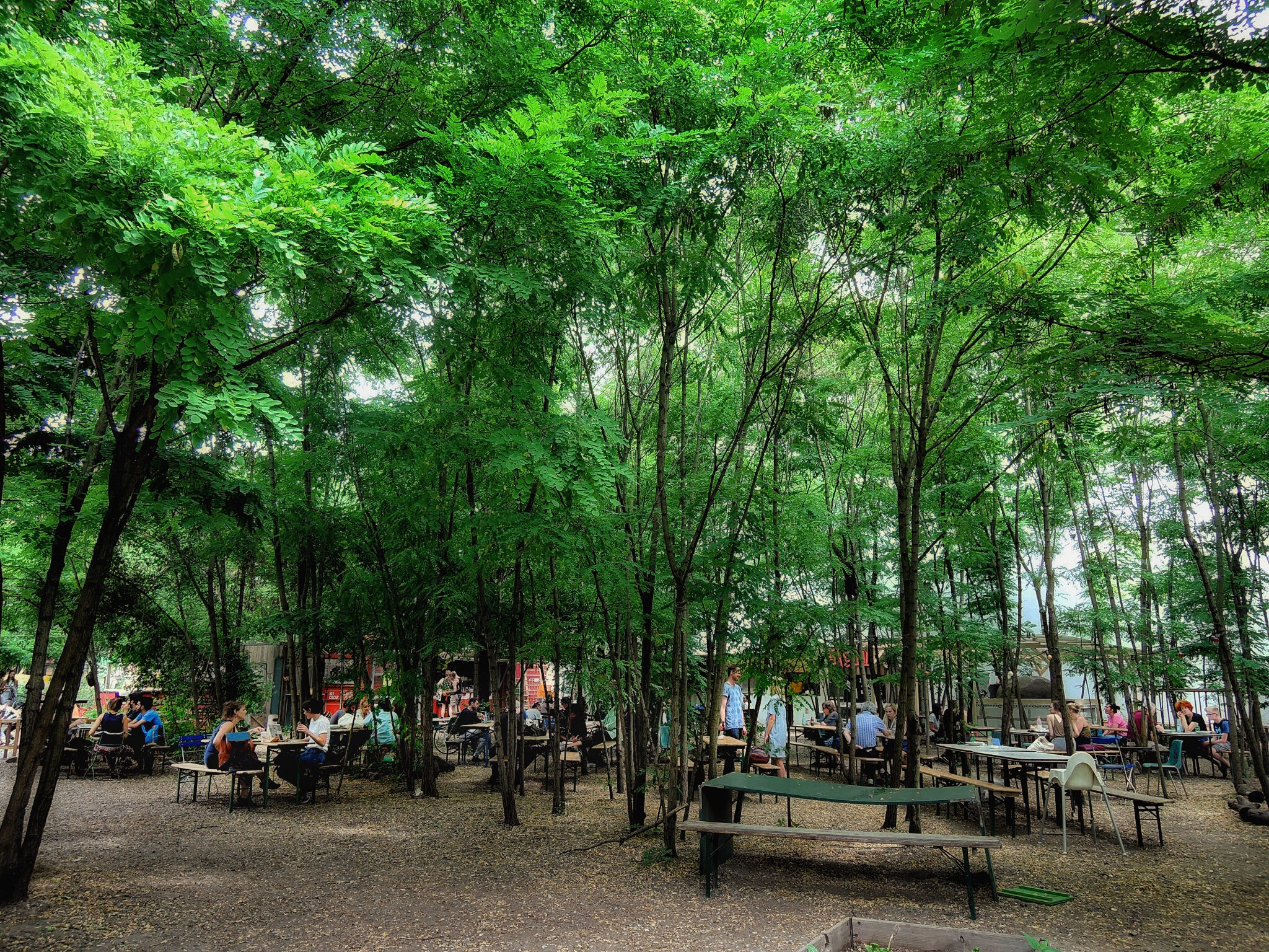 Prinzessinnengärten, Berlin